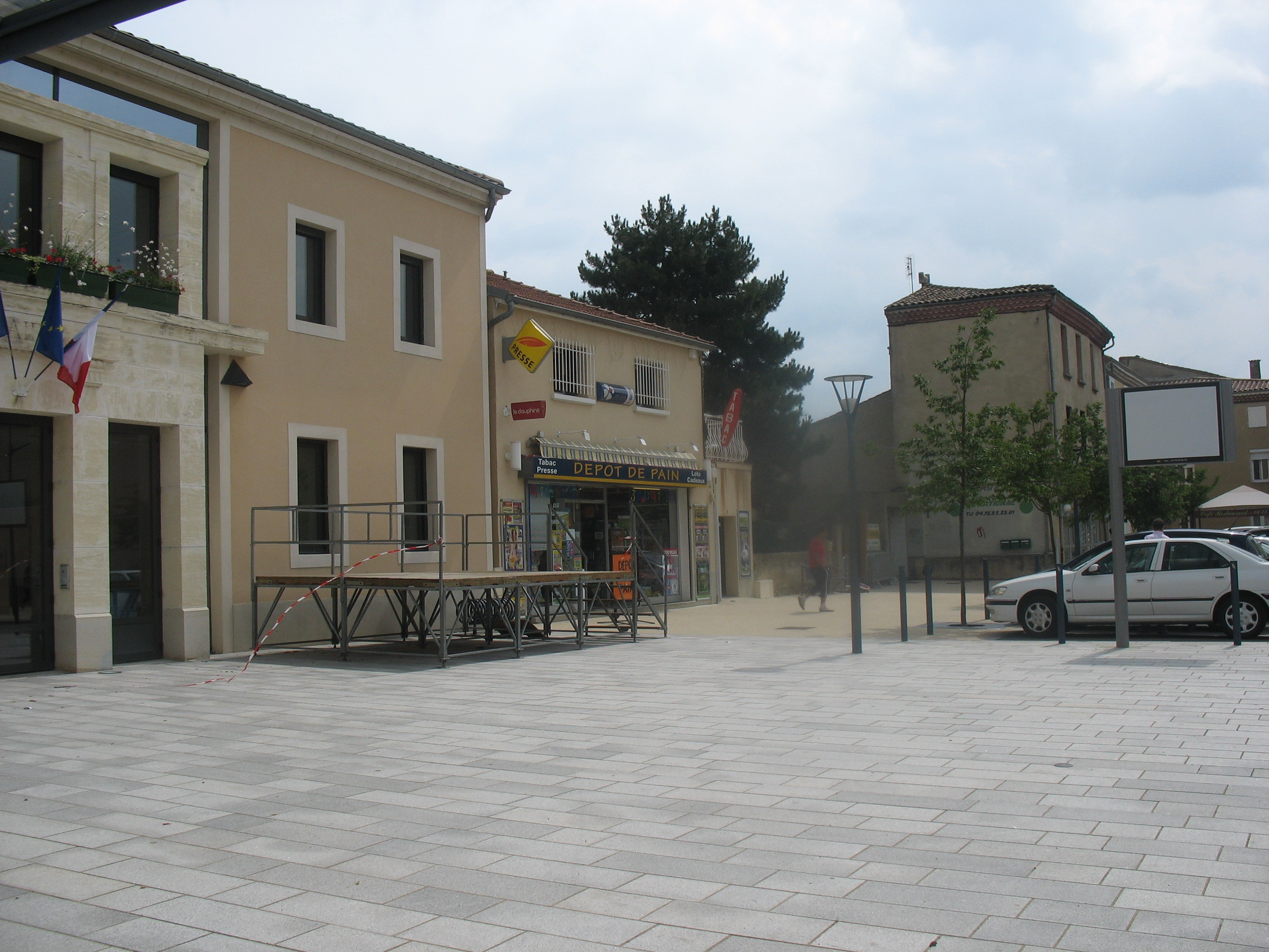 Place principale du village de Malissard